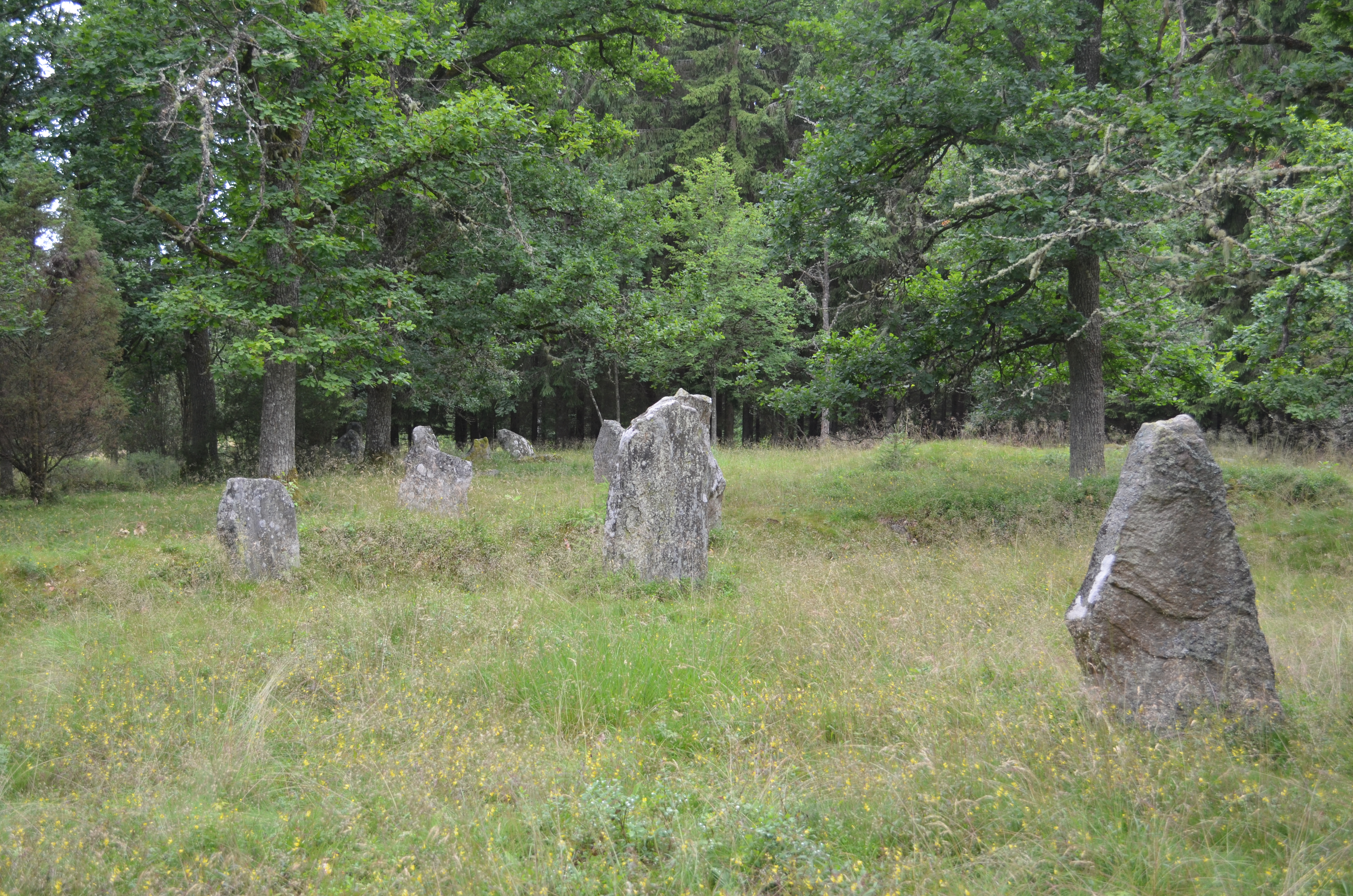 Del av fornlämningen Brudföljet i Hovs socken, Gäsene härad, Herrljunga kommun, Västergötland, Västra Götalands län, Sverige. Över gravfältet går en gropavall.